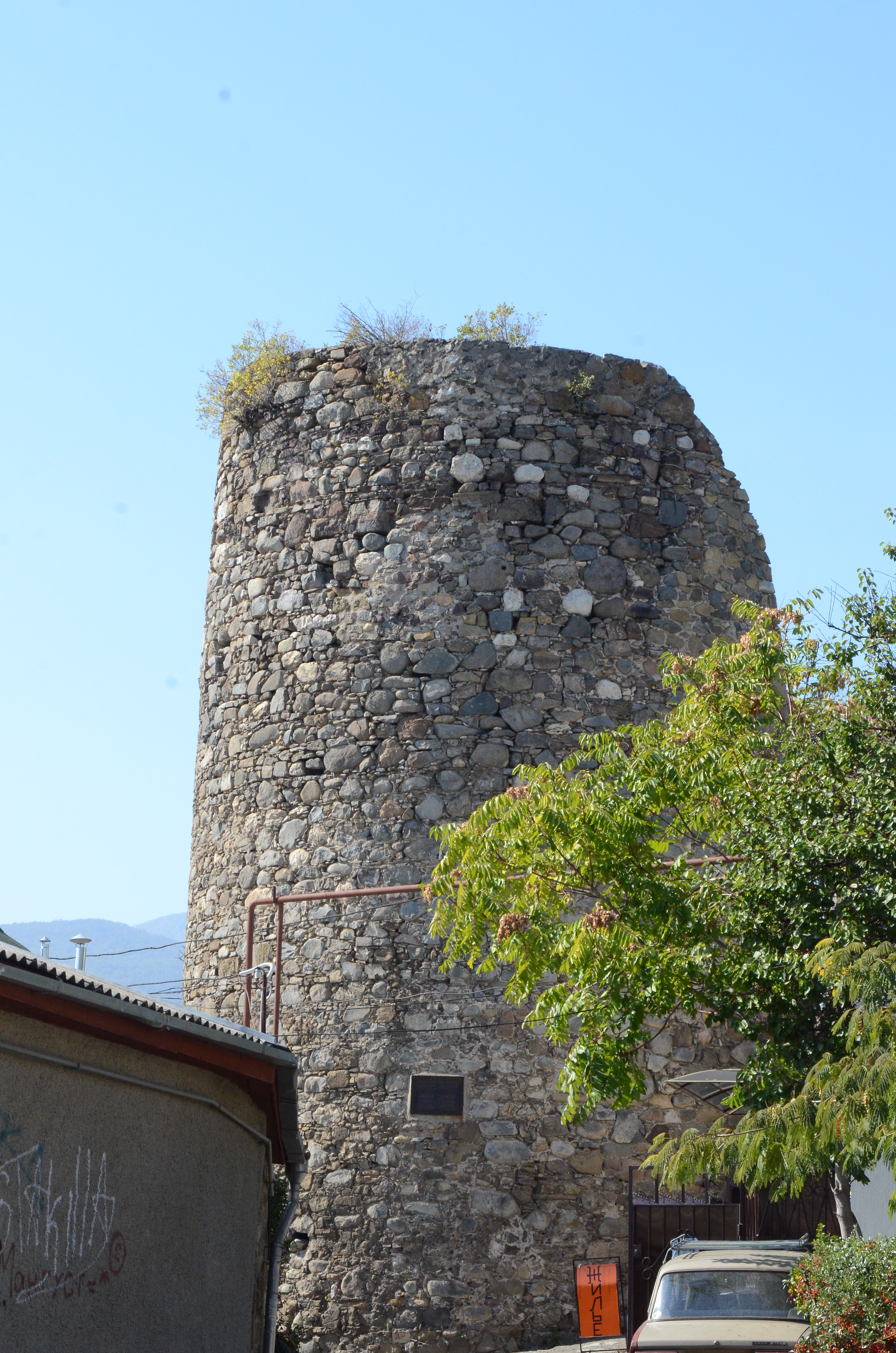 Алушта